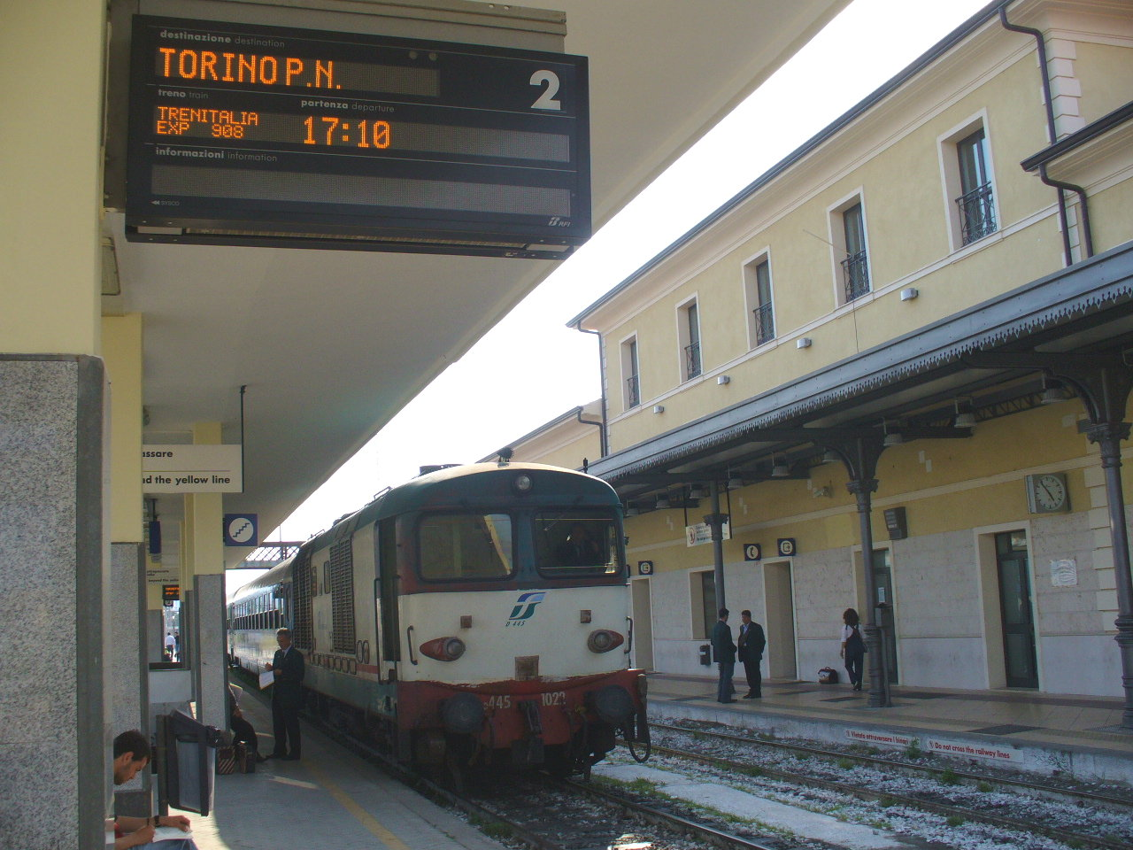 Una D.445 all'interno della stazione di Catanzaro Lido